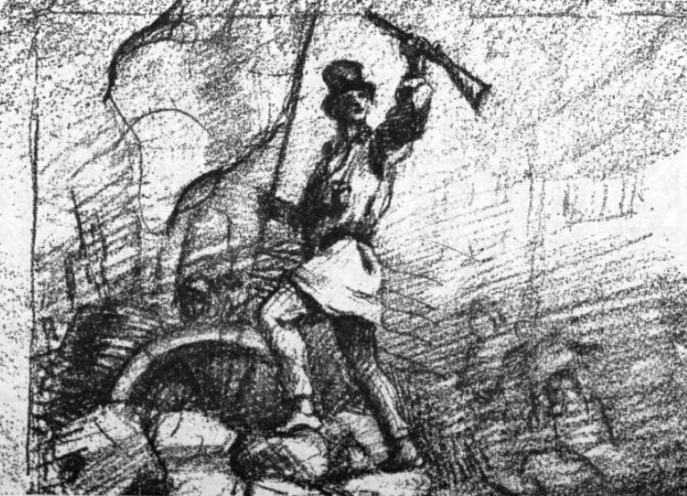 "Dessin inédit de Courbet (appartenant à Mademoiselle Courbet)". Dessin de Courbet pour Le Salut public de Baudelaire (1848).